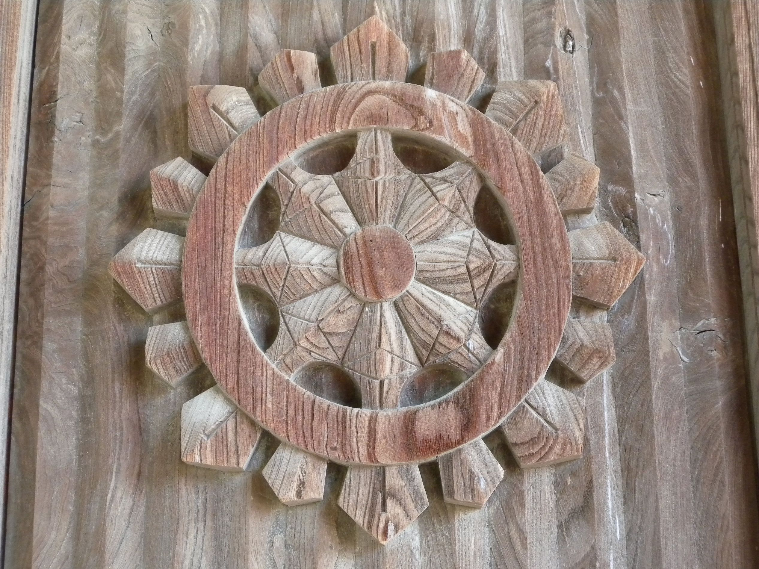 神社の社紋彫刻